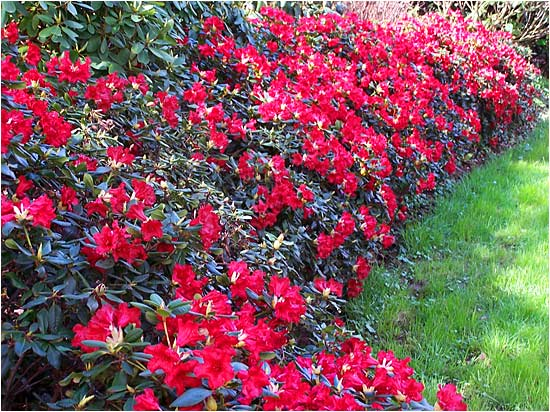 Arboretum w Wojsławicach, woj. dolnośląskie